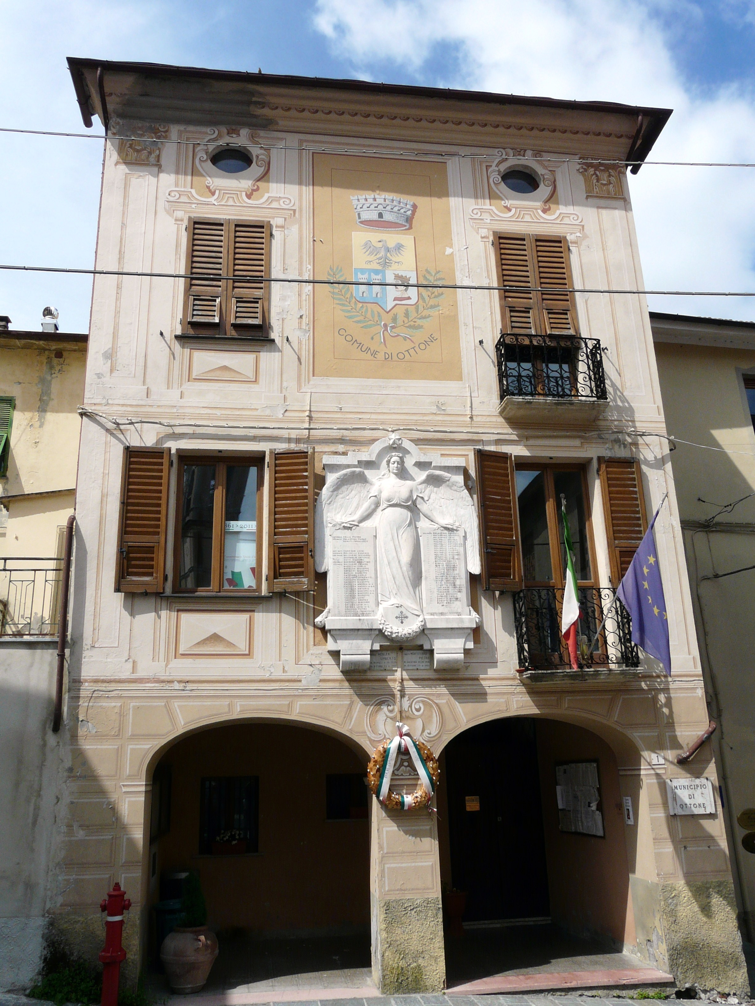 Municipio di Ottone, Emilia-Romagna, Italia